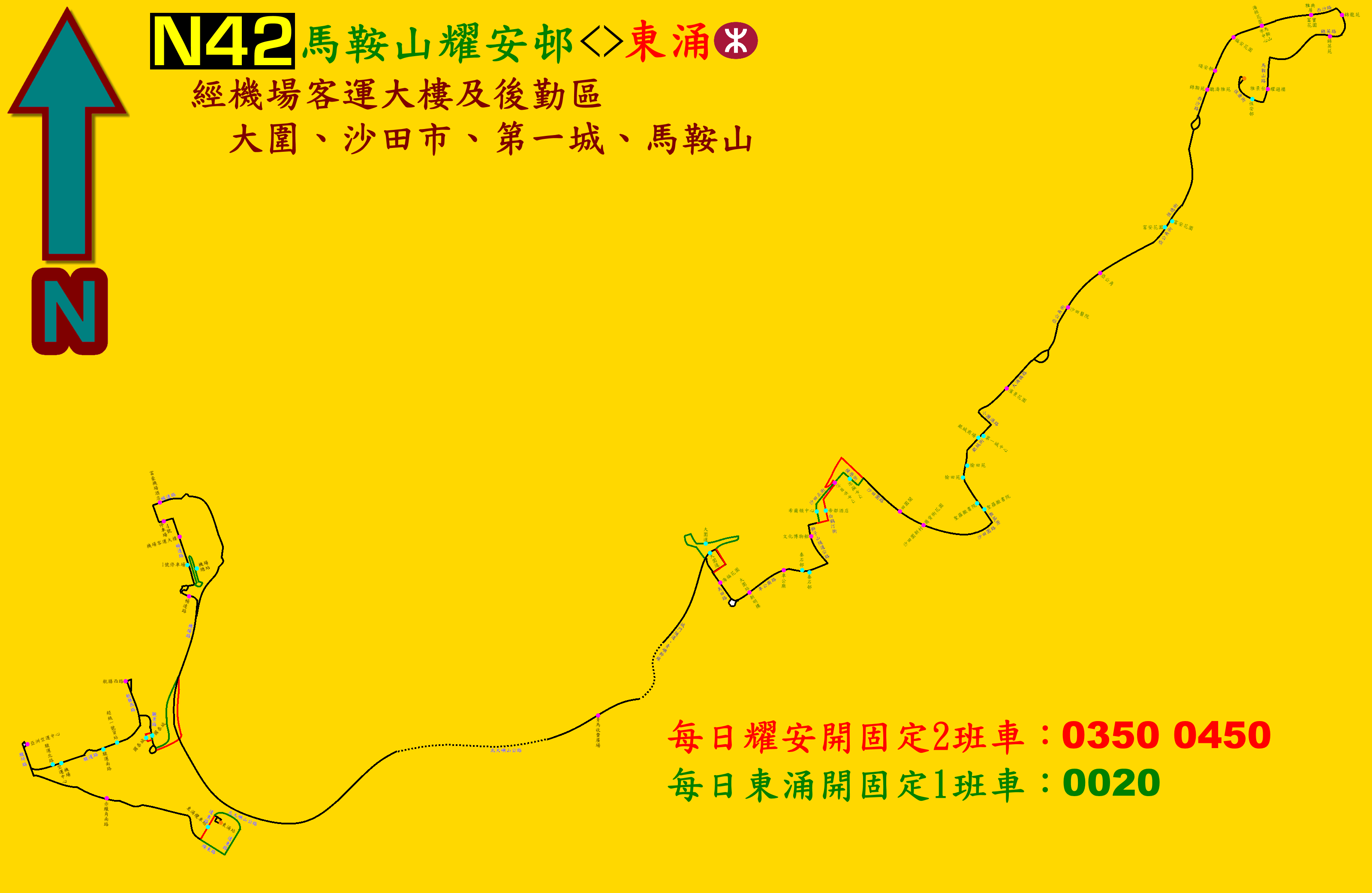 中文（香港）: 龍運巴士N42線的走線圖